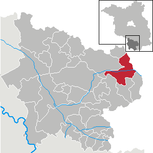 Massen-Niederlausitz in Brandenburg (Country) - District Elbe-Elster